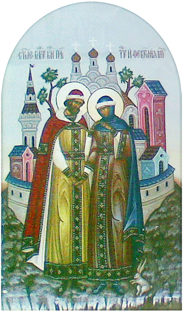 Святые Пётр и Февронья. Фреска. Спасо-Преображенский монастырь (Муром). 2000-е гг. Комп. обработка: В. Лобачев